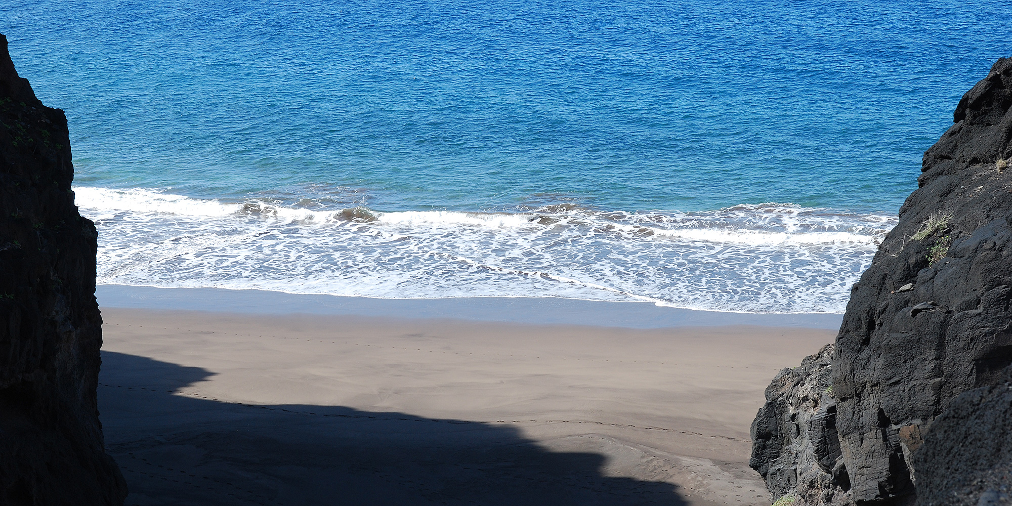 Der Playa de Guigui kurz vor dem Abstieg fotografiert